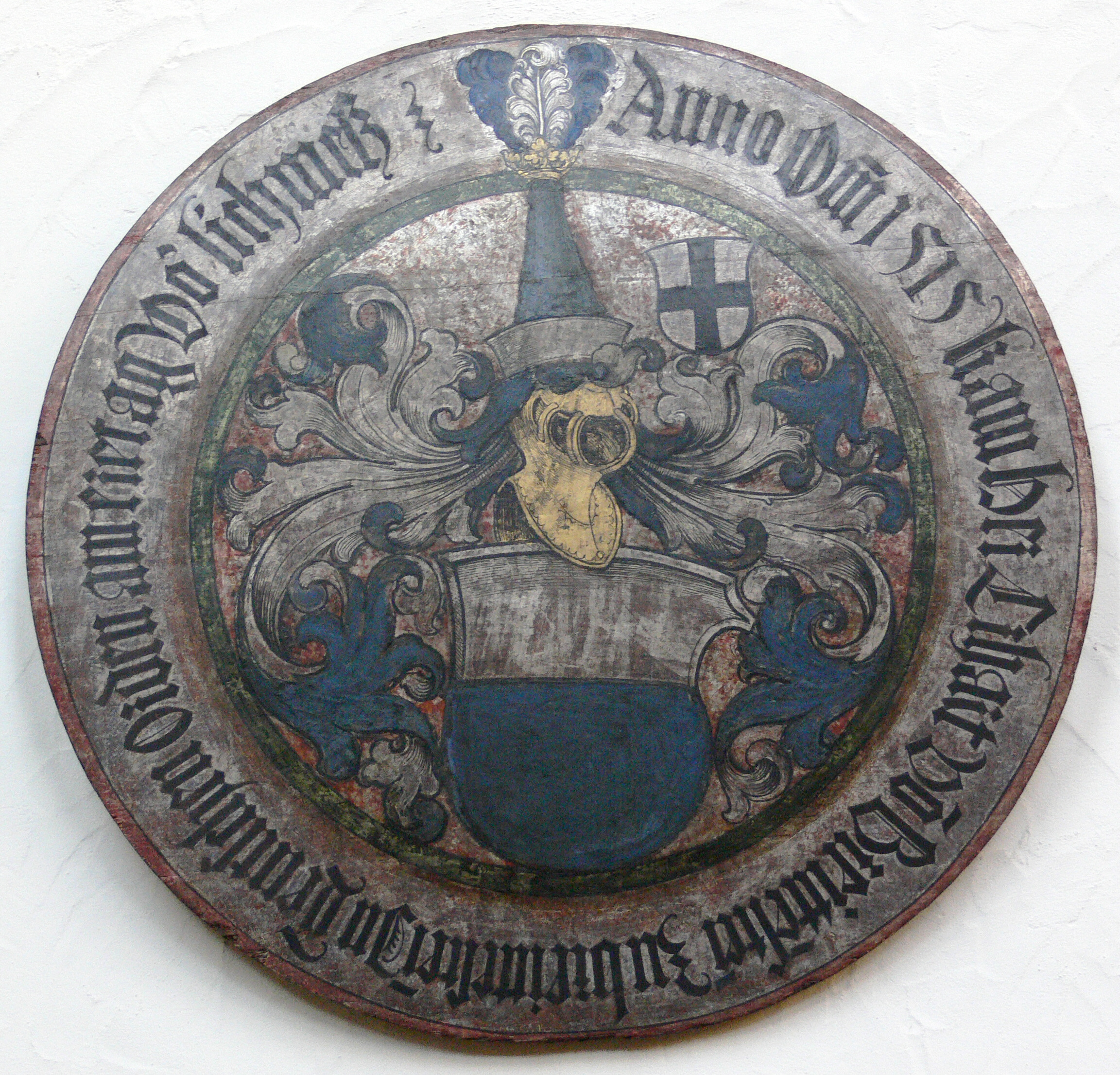 Nürnberg, Kirche St. Jakob Aufschwörschild des Deutschen Ordens; Erhart von Breitenstein, 1515, näheres siehe hier